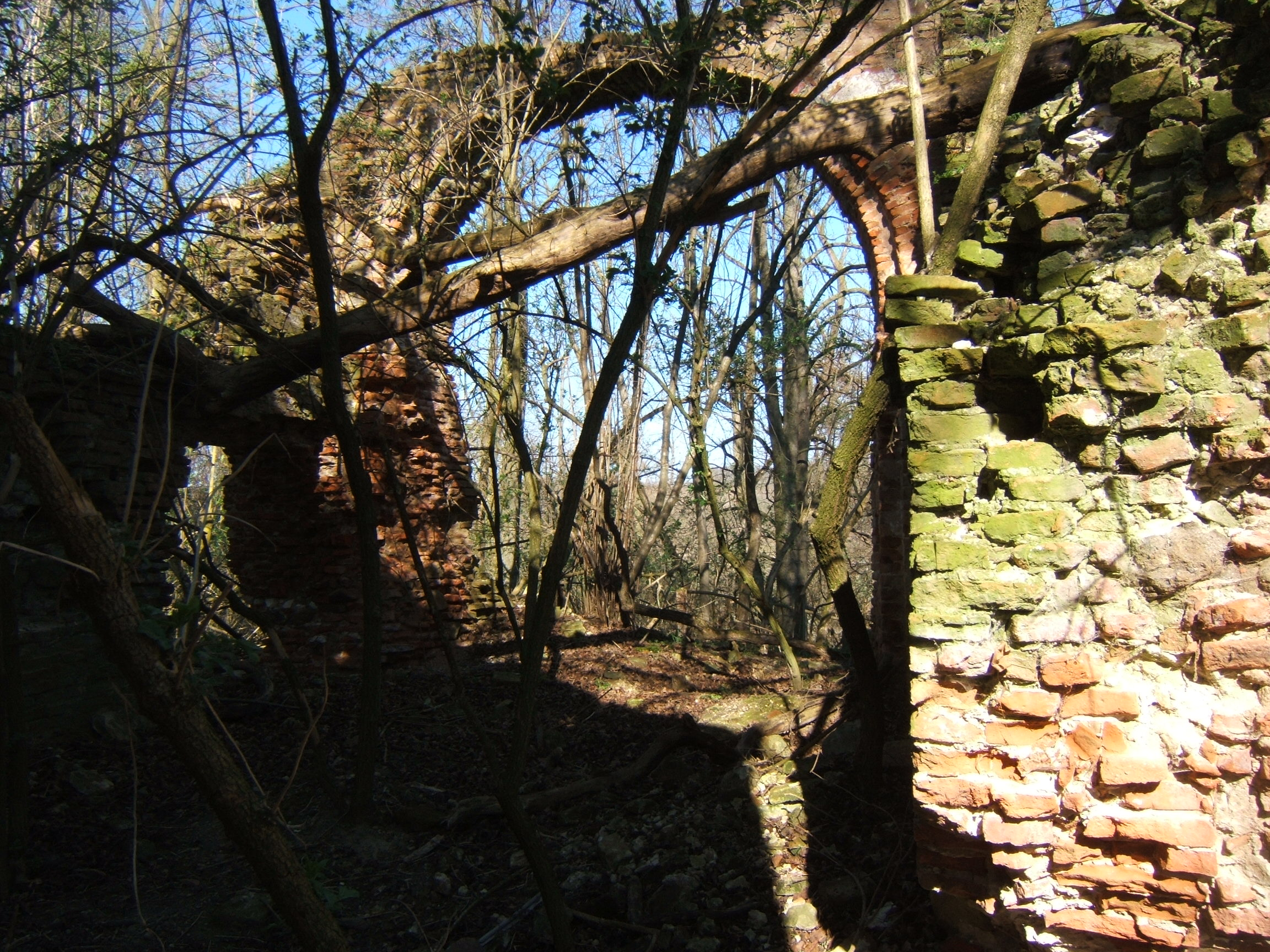 Hács, középkori templom romja